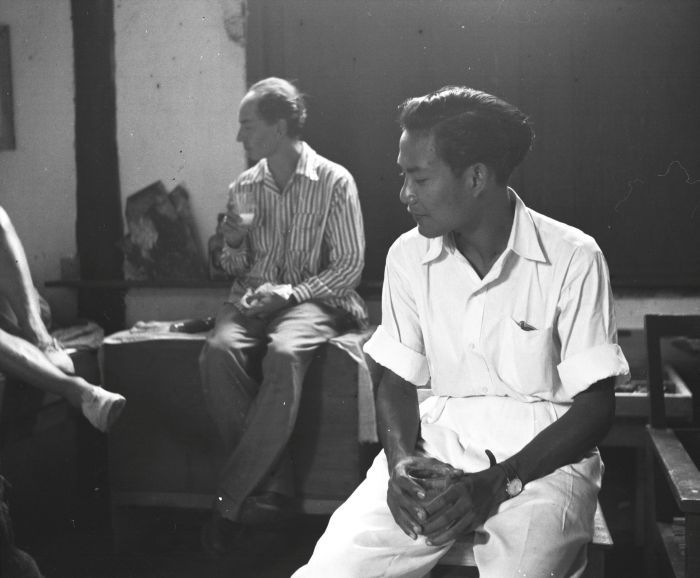 negatief. Dewa Ketut Beng Gunarsa en de Spaanse kunstenaar Antonio Blanco in de studio van Theo Meier, Iseh